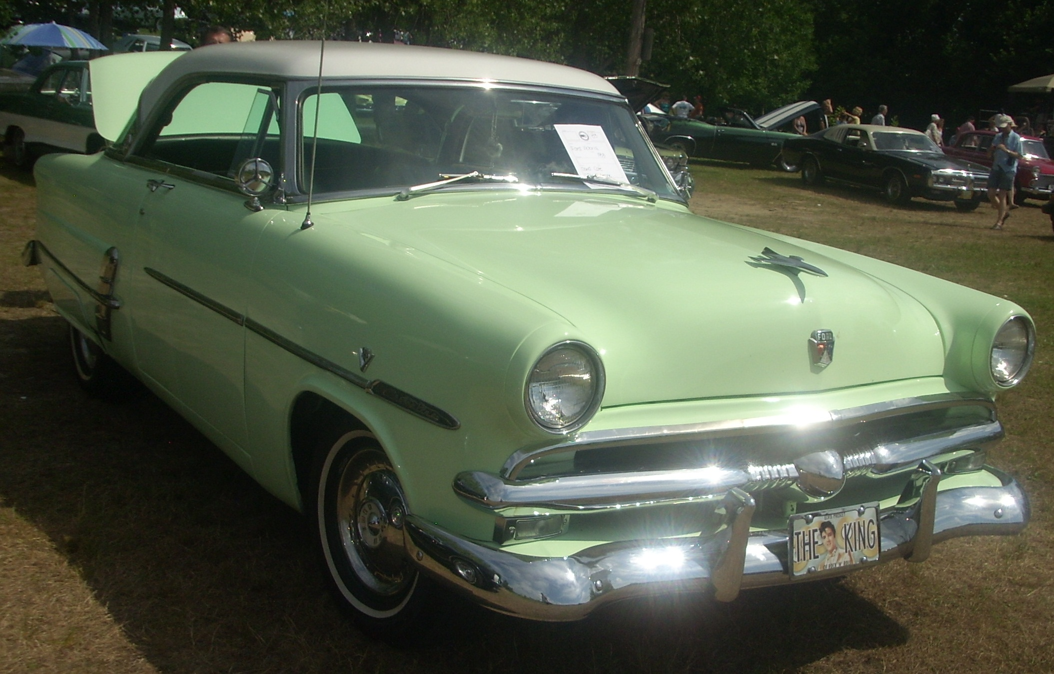 1953 Ford Victoria photographed in Laval, Quebec, Canada at Auto classique Laval 2010.